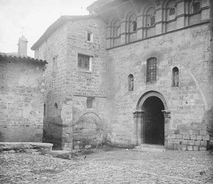 Imatge